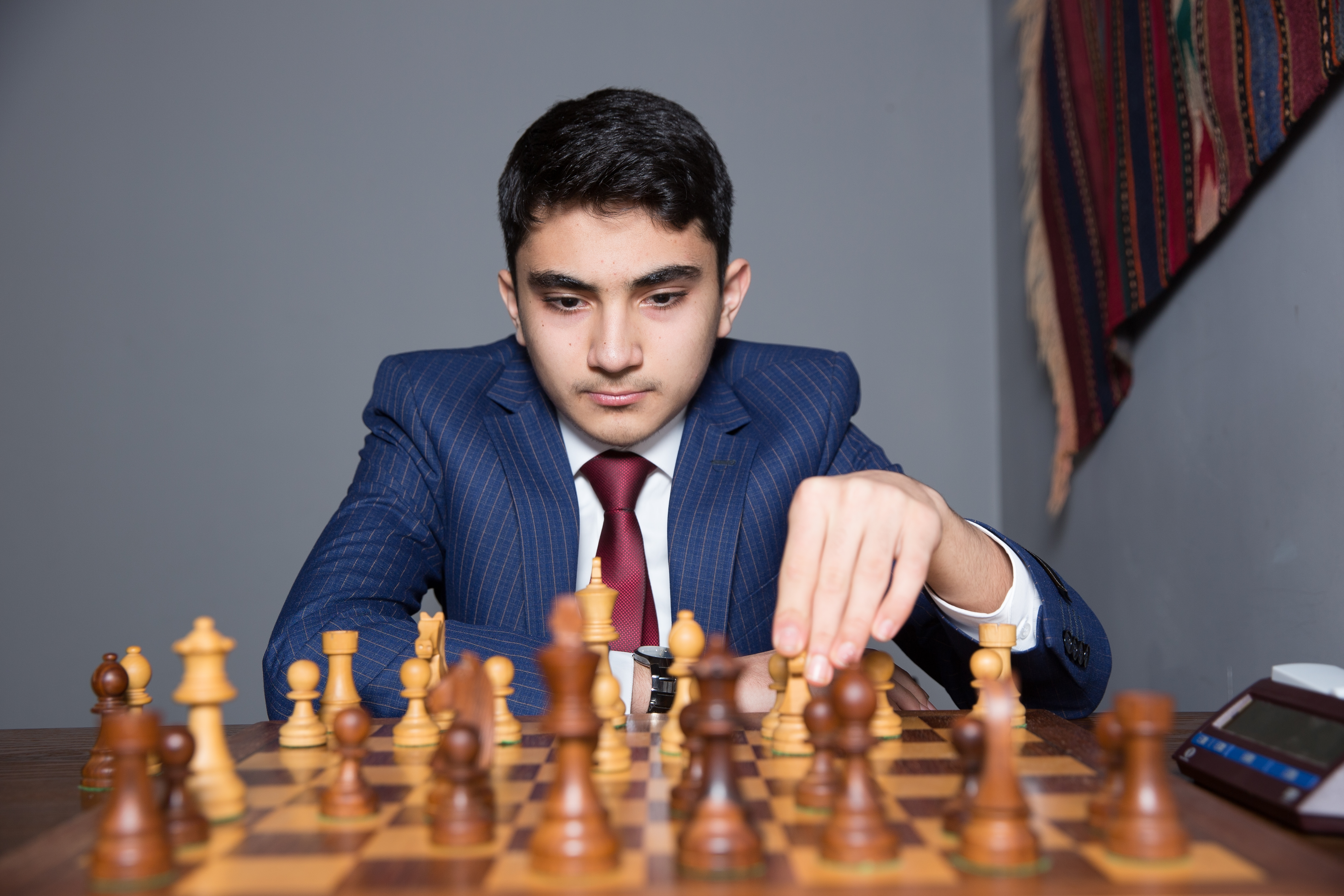 Abdulla Qədimbəyli